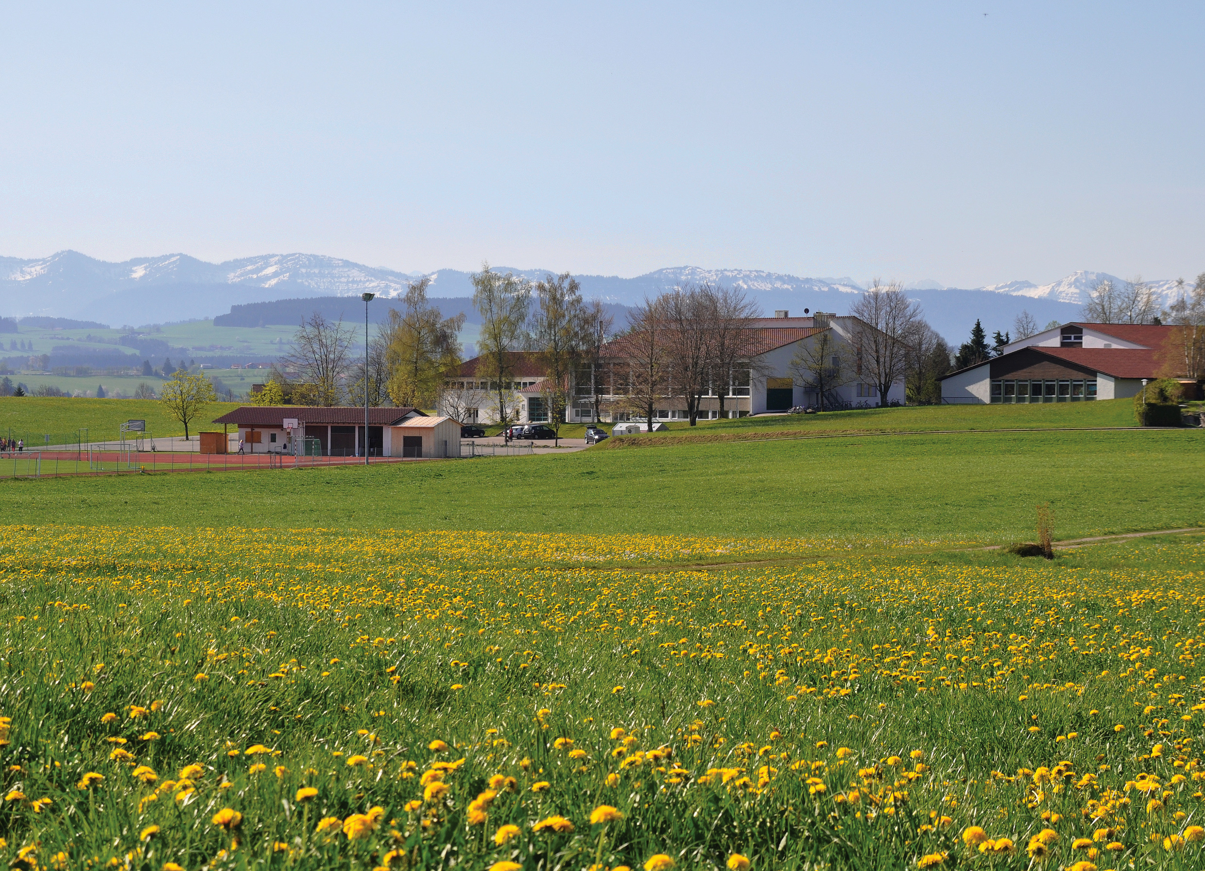 Lage der Gemeinschaftsschule mit Sportanlage, Lehrschwimmbecken und Turnhalle